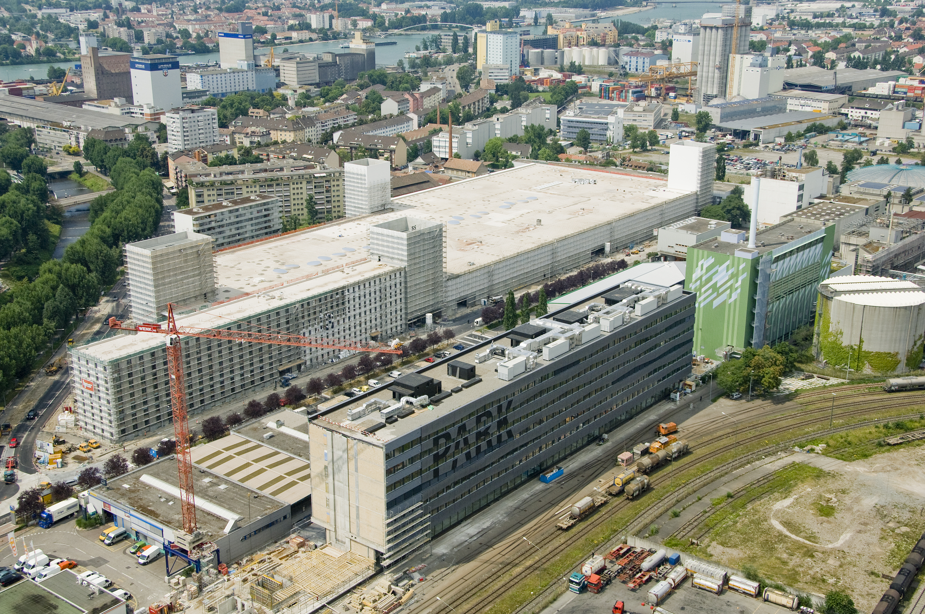 Luftaufnahme des Stücki Shopping während der Bauphase im Sommer 2009